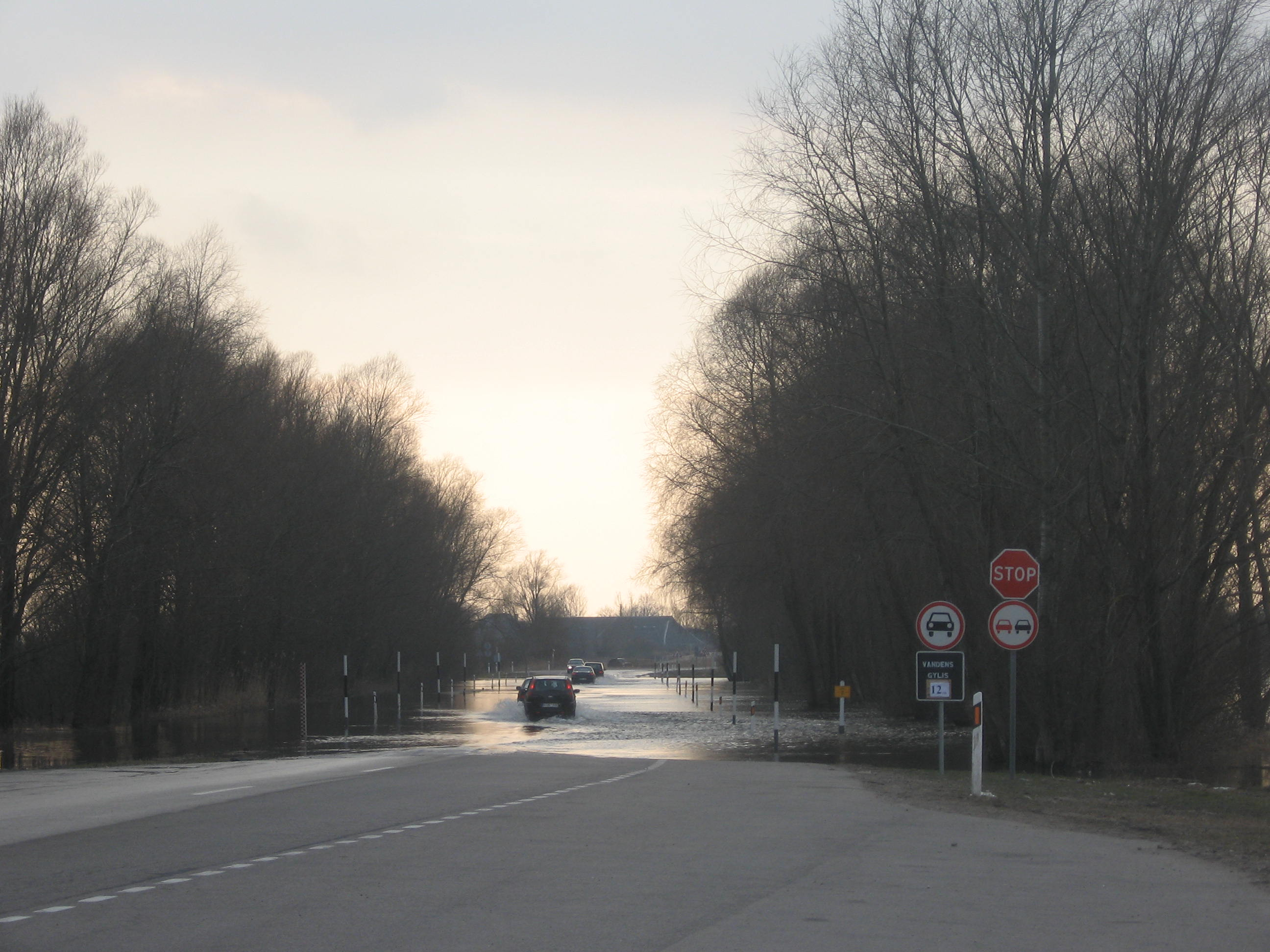 Apsemtas Šilutės - Rusnės kelias